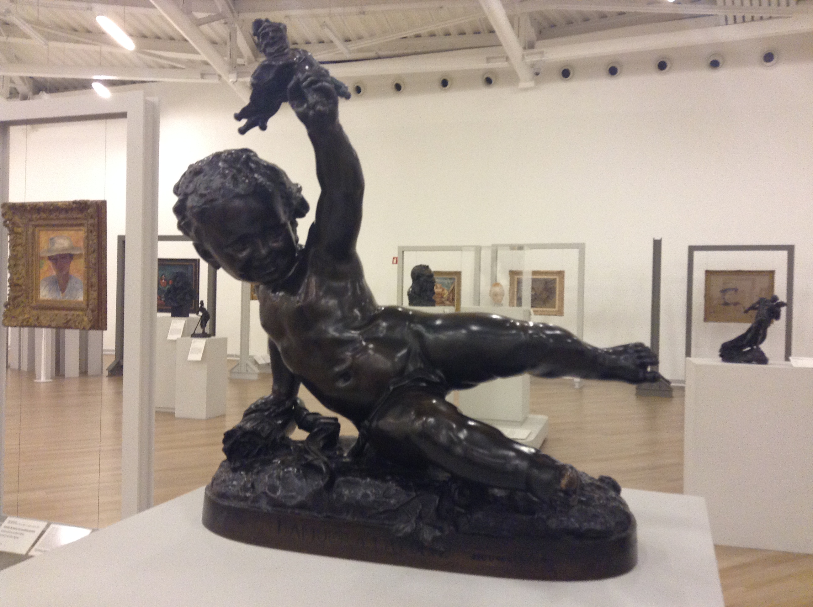 La obra "L'amour à la folie",vaciado en bronce con patina café oscuro y café, de Jean Baptiste Carpeaux, expuesta en el museo Soumaya.